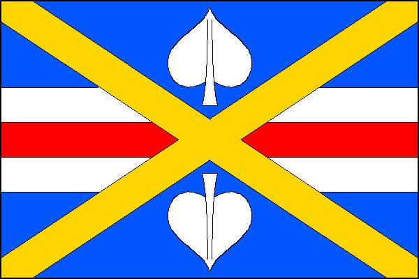 Vlajka obce Sulíkov